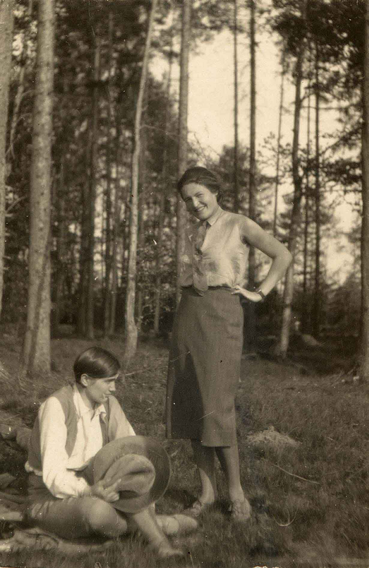 Franziska Umfahrer mit einem Freund